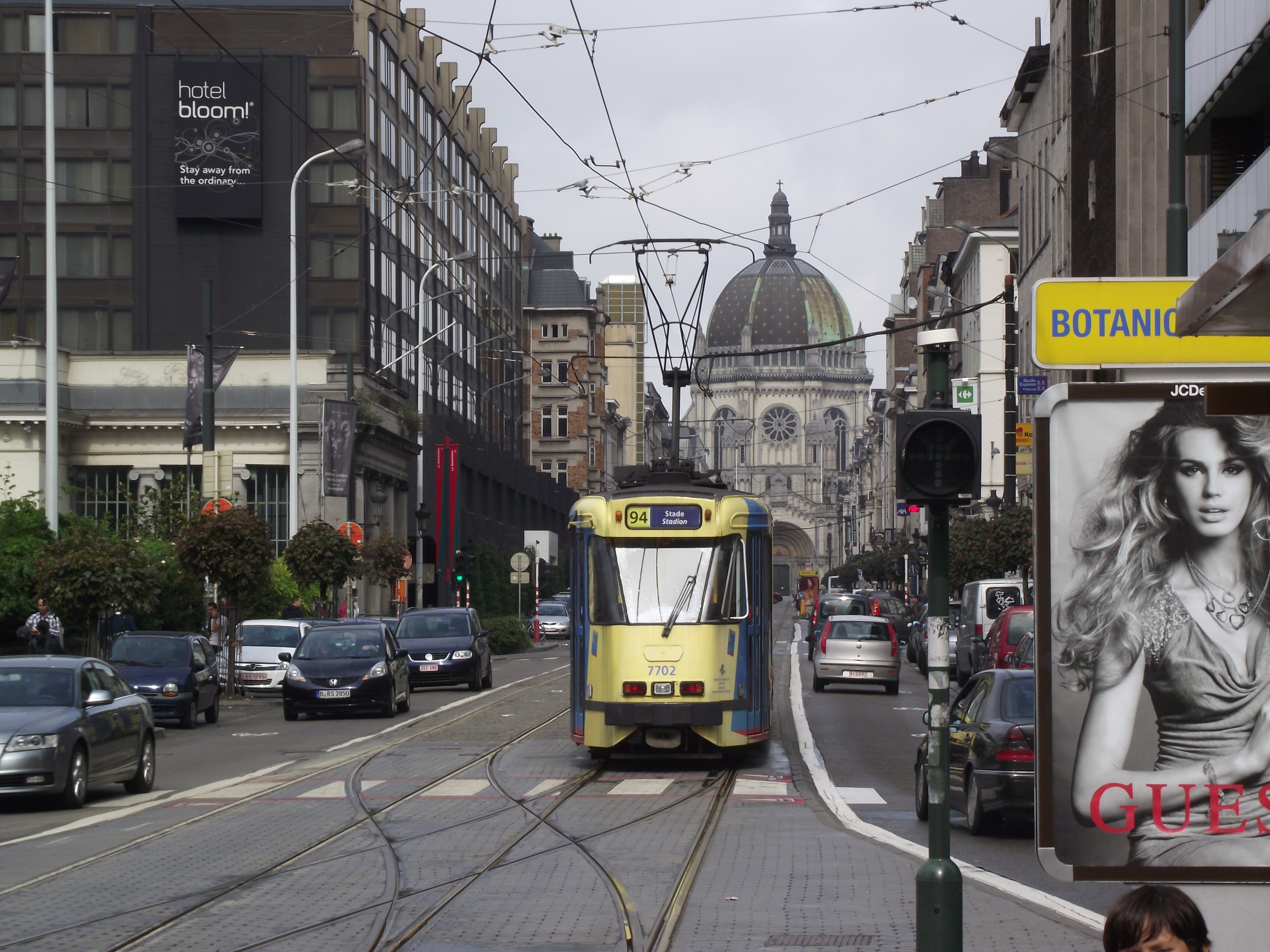 Lijn 94 in de koningstraat bij Sint-Joost gezien vanaf de Botanische tuinhalte.